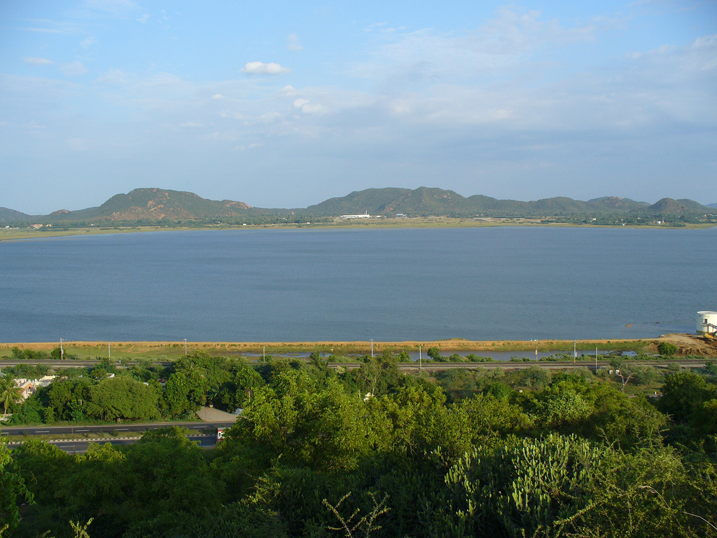 chengalpat lake